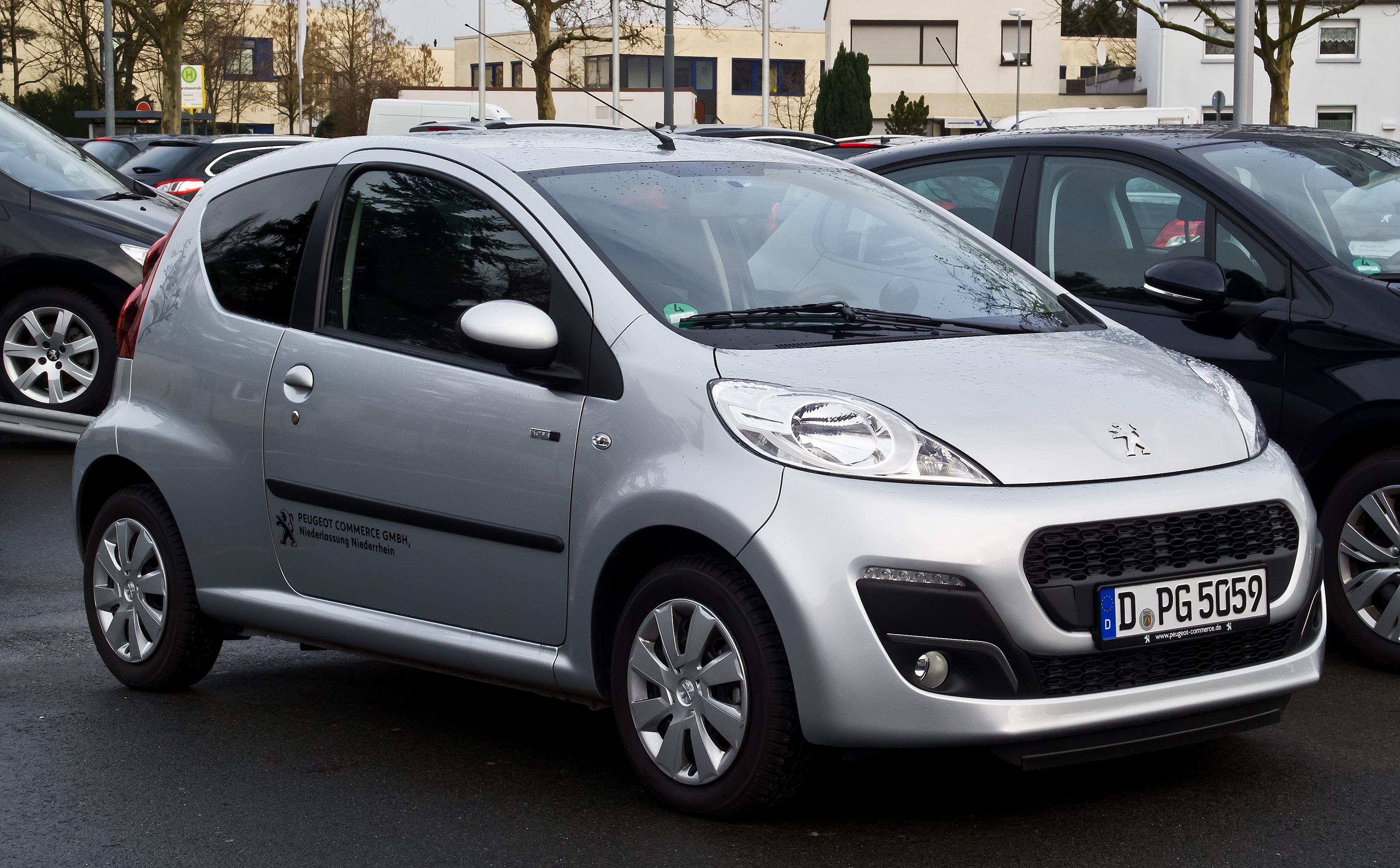 Peugeot 107 68 Style (2. Facelift)